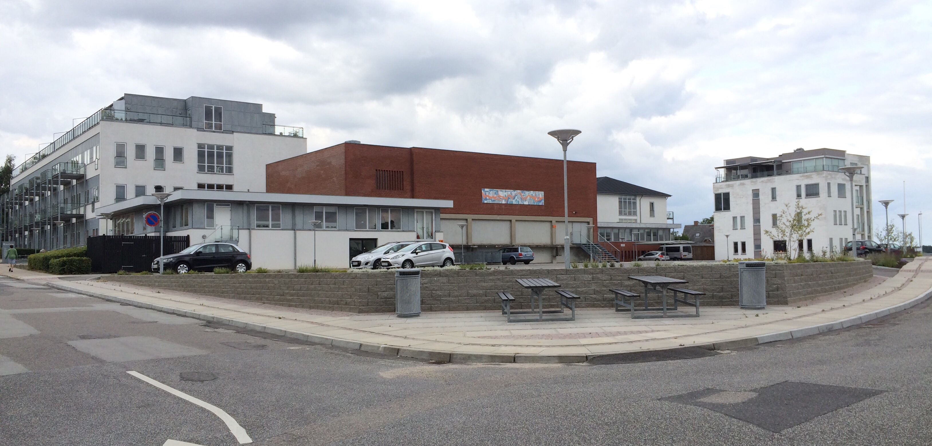 Etableringen af de nye parkeringspladser ved Hadsund KulturCenter er ved at blive etableret i september 2014